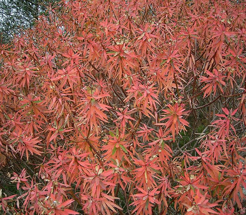 Euphorbia dendroides Puig de Santa Magdalena close to Inca, Mallorca, Spain